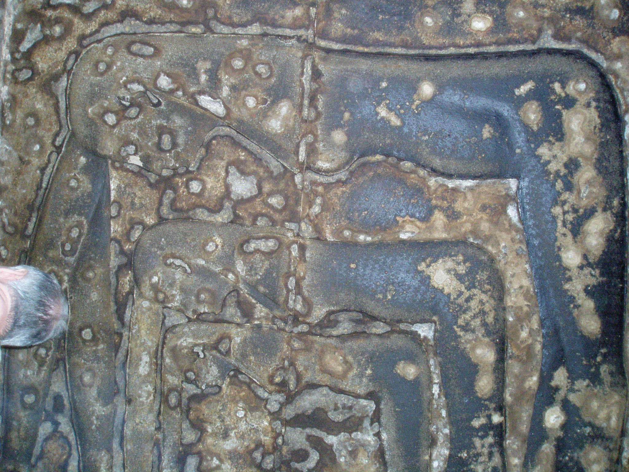 rare triple Nut at Dendera, Egypt